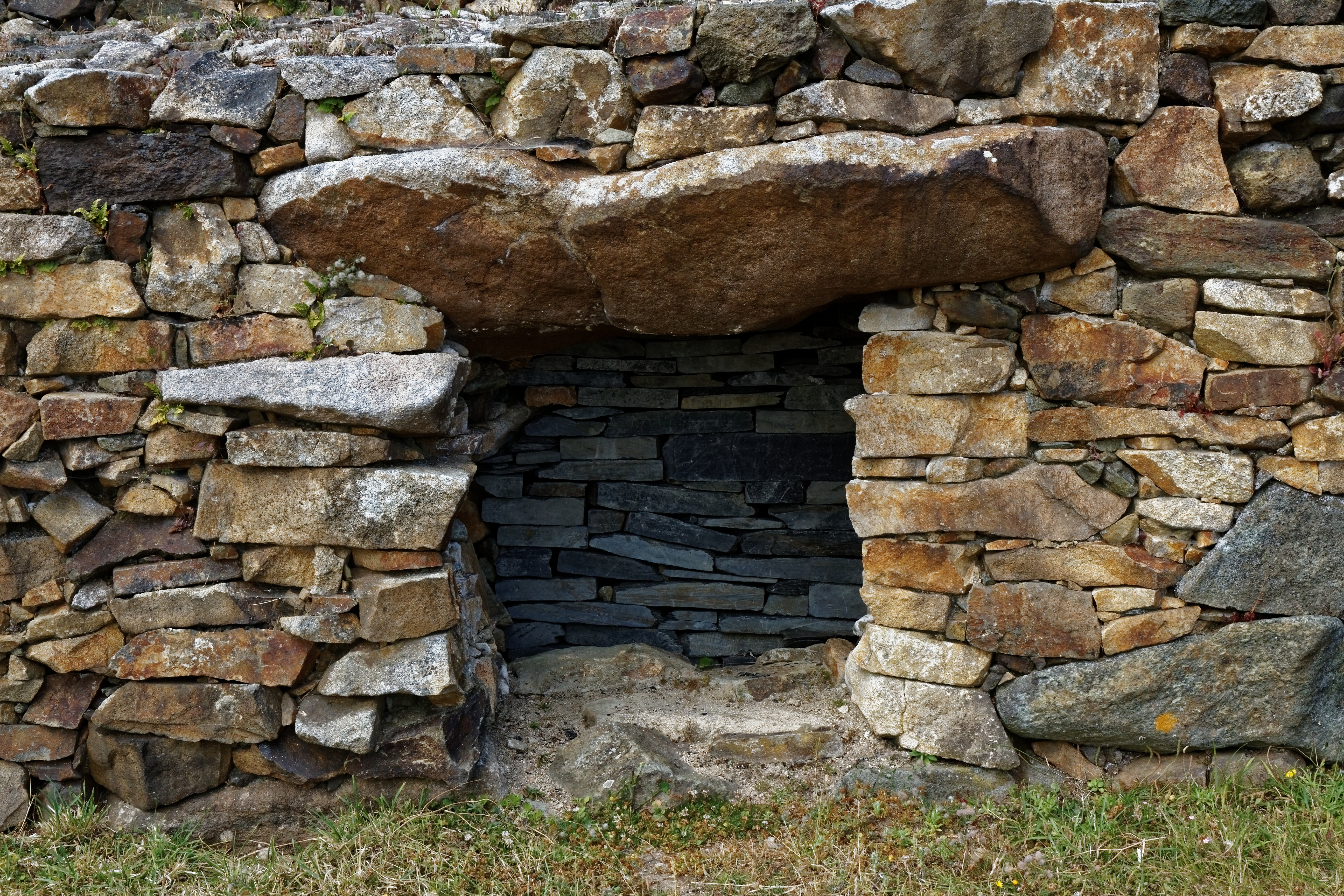 Panorama du Cairn de Barnenez à Plouezoc'h dans le Finistère. .